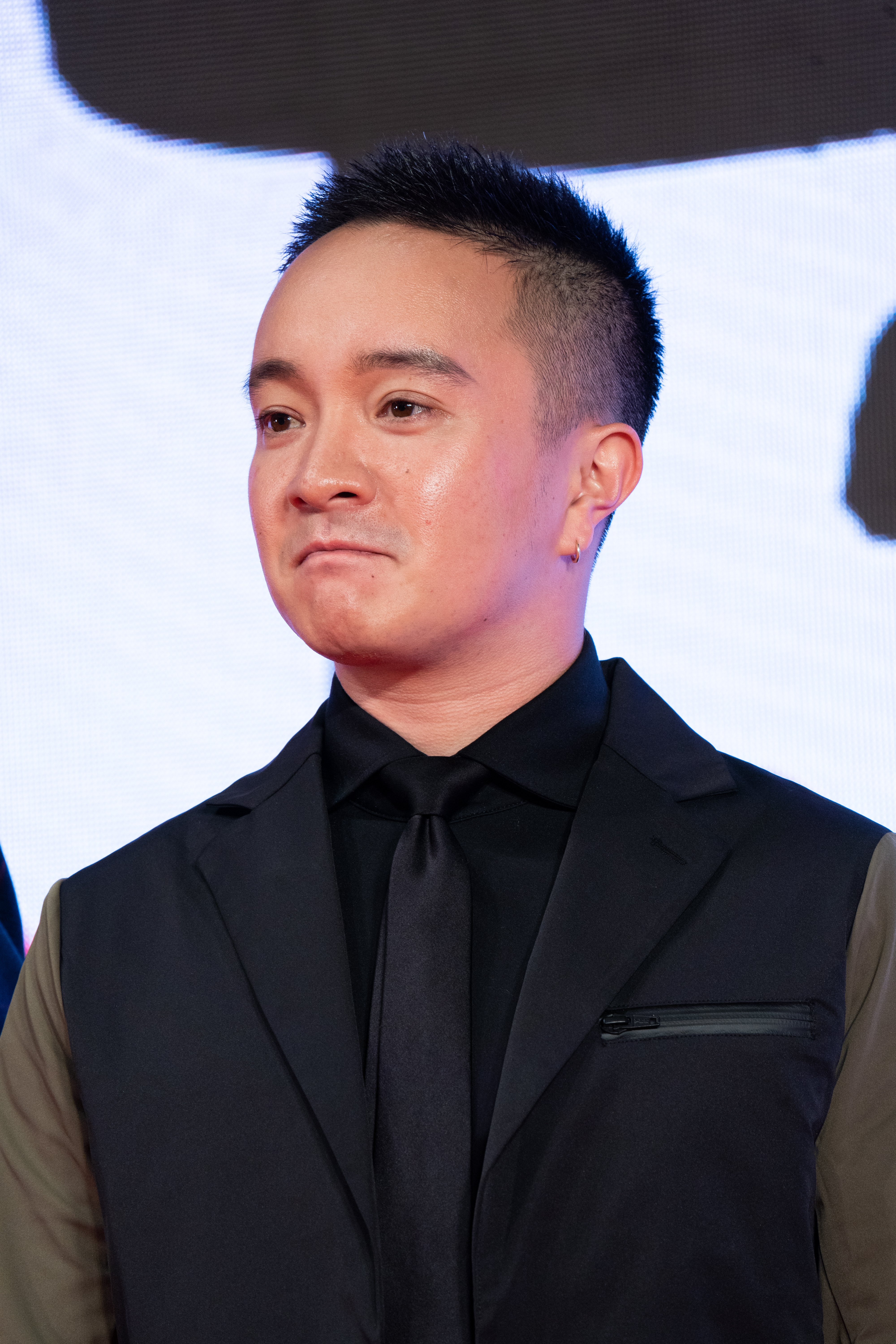 第32回 東京国際映画祭 オープニングセレモニー 濱田岳 (喜劇 愛妻物語)